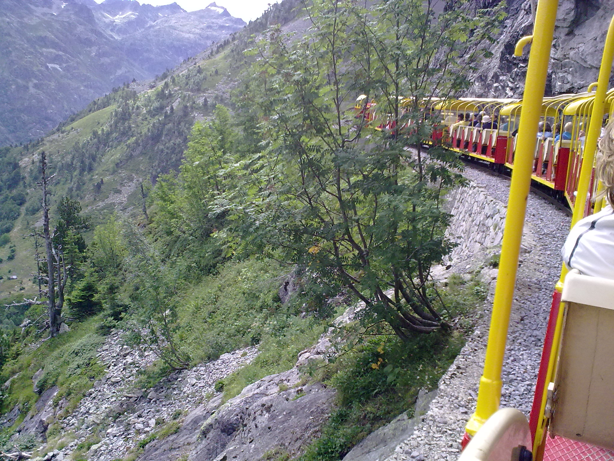 Le petit train d'Artouste le 25 juillet 2010.